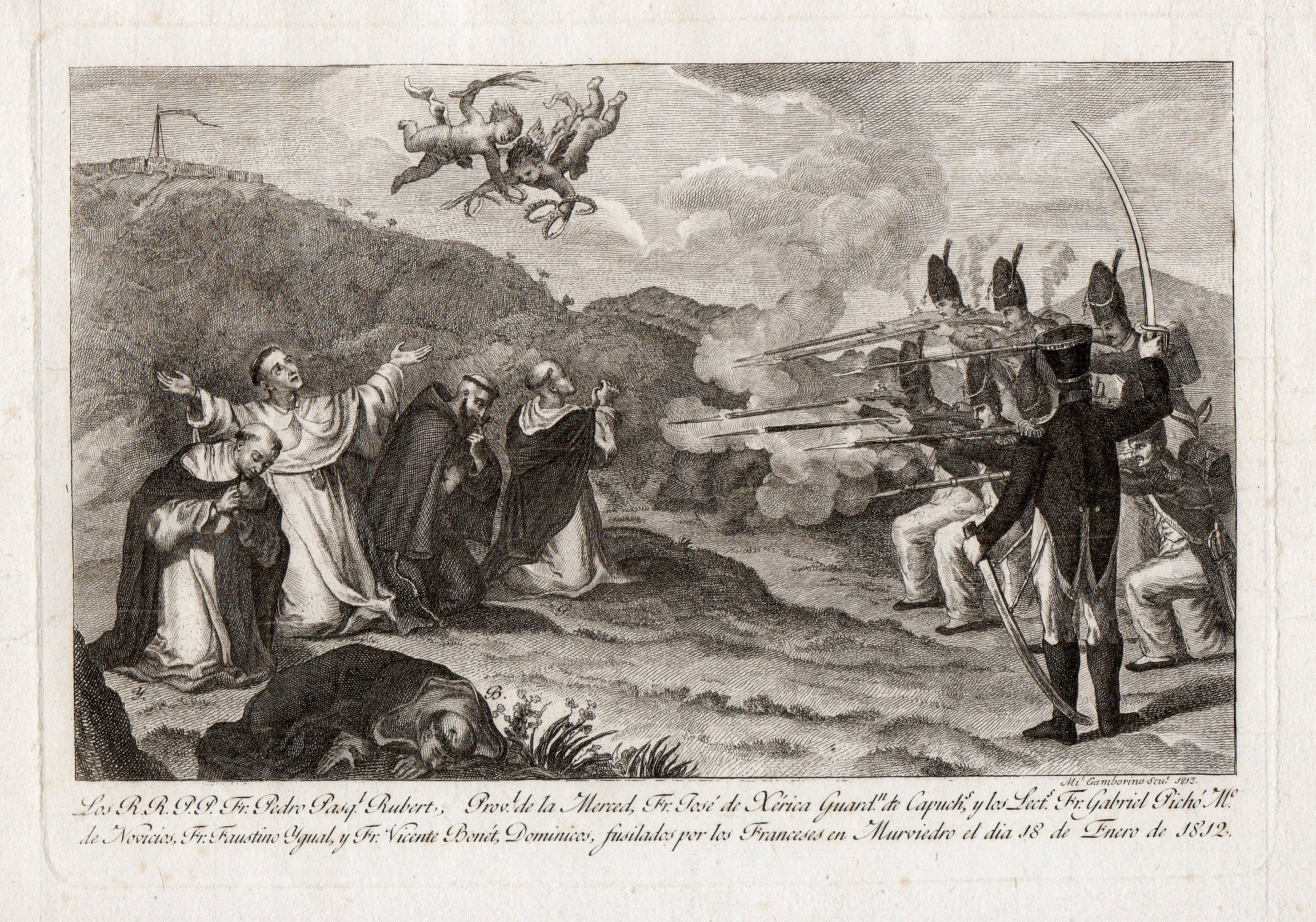 L'Assassinat de cinq moines à Murviedro, burin et eau-forte de Miguel Gamborino. Des moines sont fusillé à Murviedro le 18 janvier 1812.